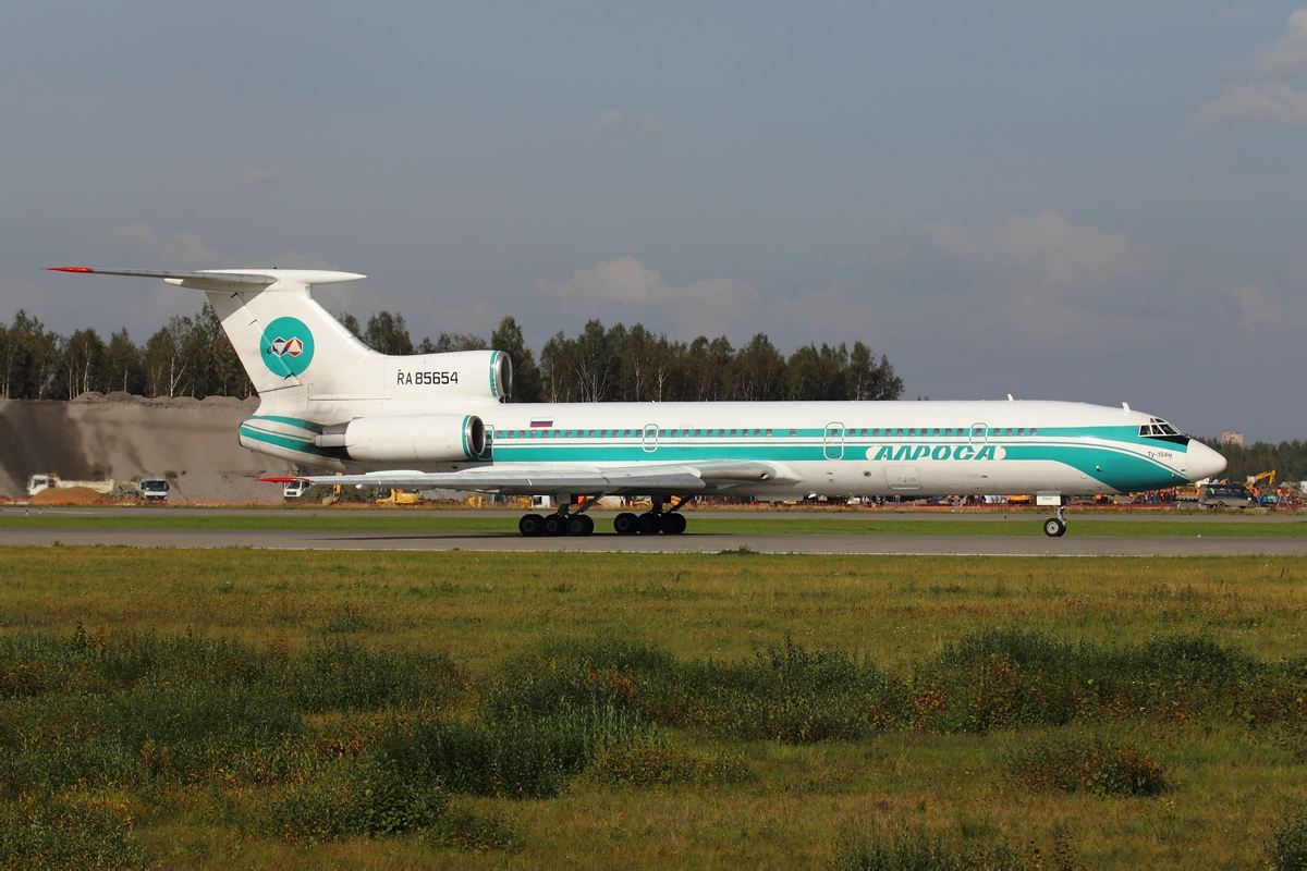 Alrosa Mirny Air Enterprise Tupolev Tu-154M